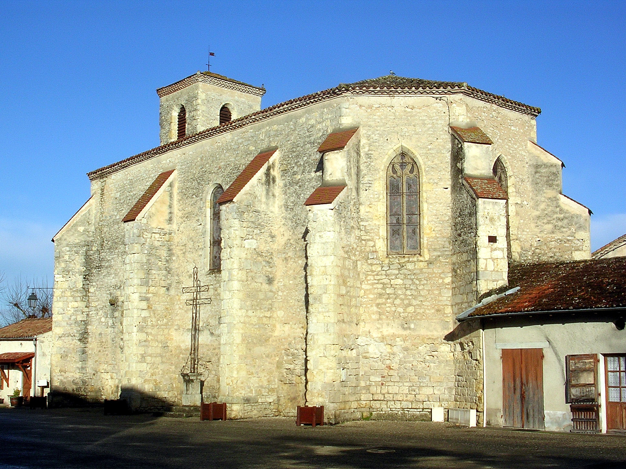 église de Durance, dans le Lot-et-Garonne (France)